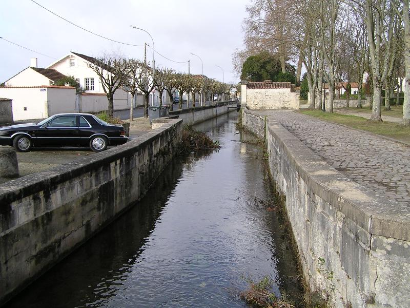 douves de Saint-Jean-d'Angély